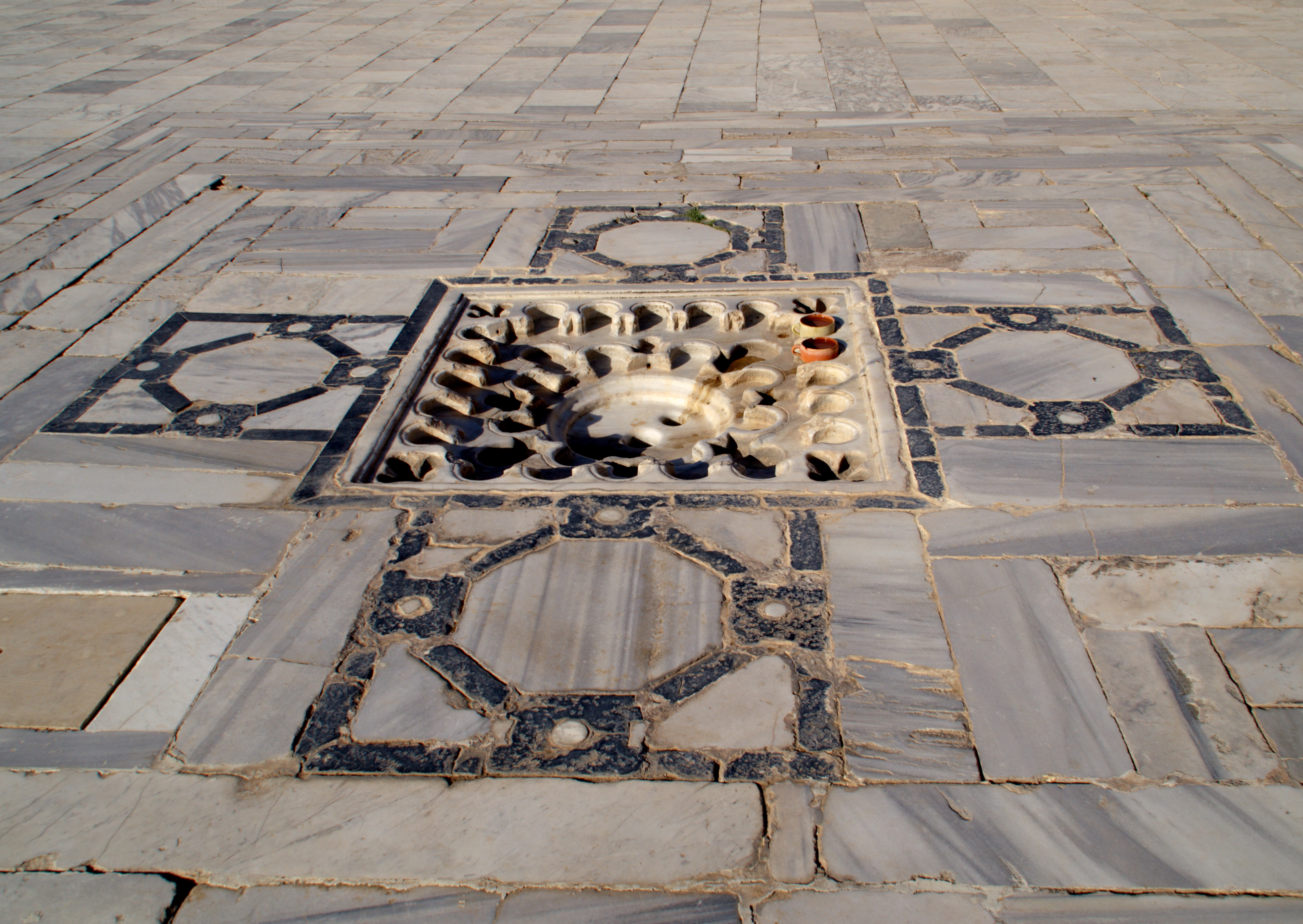 Grande Mosquée (Sidi Okba), Kairouan. Pavement de la cour, un décor géométrique en marbre noir entoure le bassin central du collecteur d'eau de pluie.